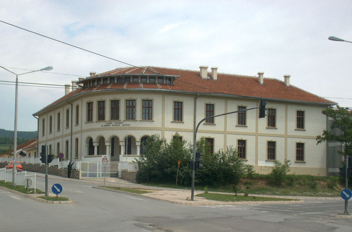 ОУ „Св. Климент Охридски“ - Делчево